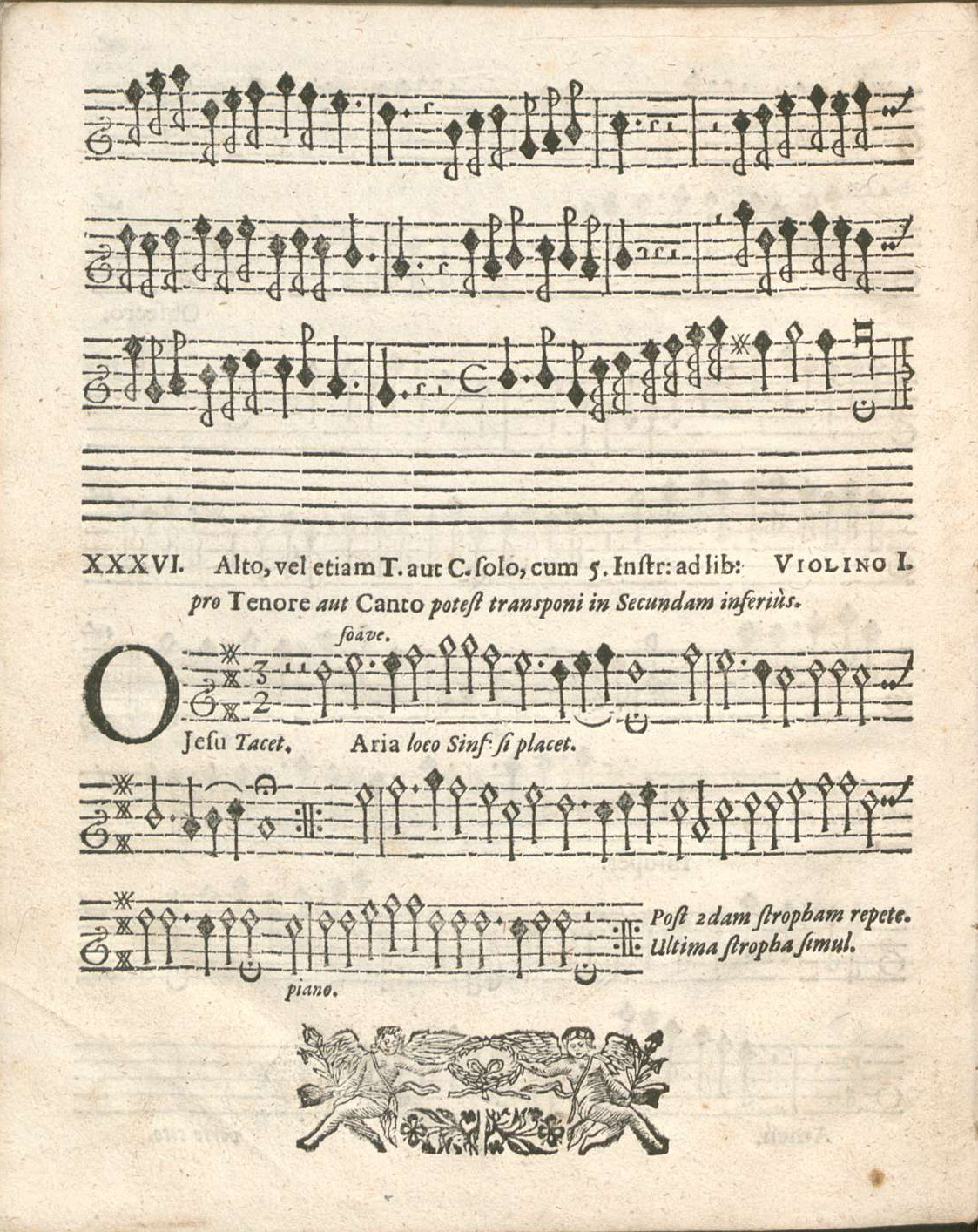 La fin du motet 35 et le motet 36 et dernier (partie violon). Johann Melchior Gletle, Expeditio musicae, classis IV, opus 5 (1677).